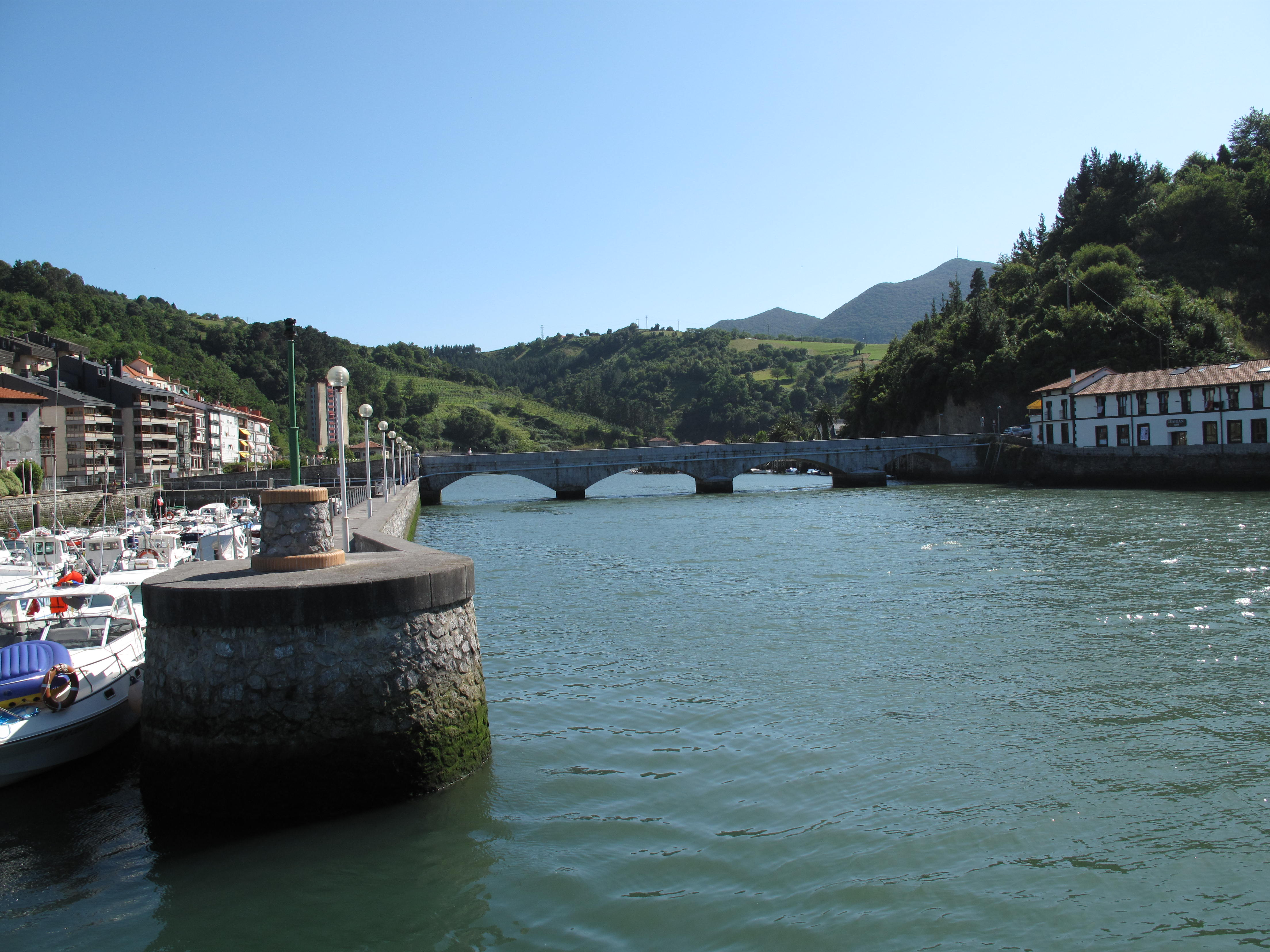 Rio Deva, en Deba (Guipuzcoa).